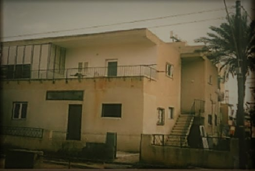 ביתו של הרב אונגרישר לפני התוספות שנעשו בו